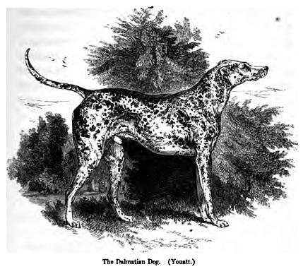 Dalmatian